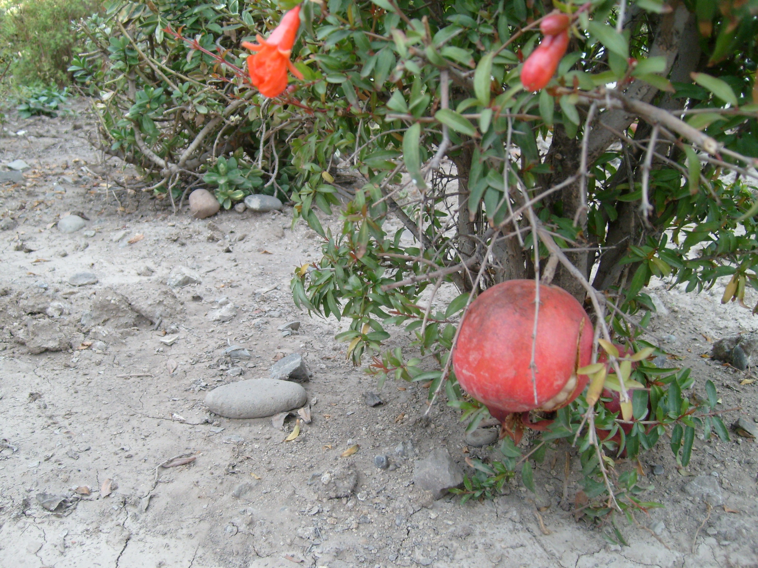 Punica granatum, pomegranate garden cultivar (does not match description of P. protopunica)